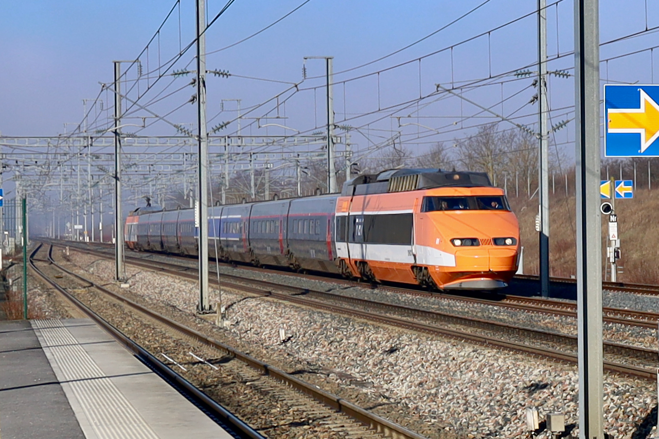 La rame 01 vue le 6 février 2020 en gare de Champagne Ardenne TGV (sur la LGV Est), en livrée d'hommage réunissant les trois livrées qu'a porté cette rame ; ce TGV effectue une tournée avant radiation.